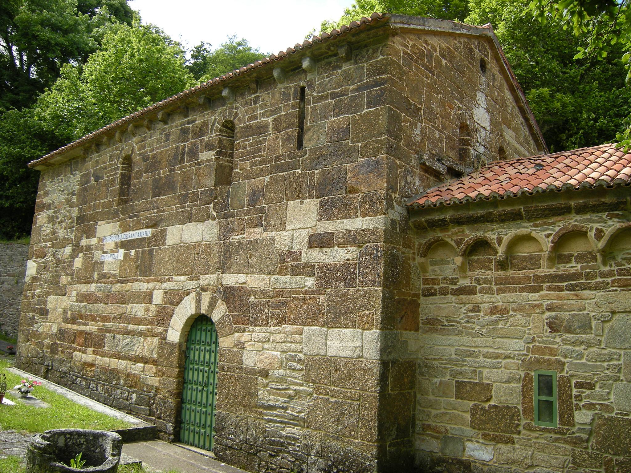 gl: Igrexa prerrománica de Sato Antolín de Toques, Toques - A Coruña